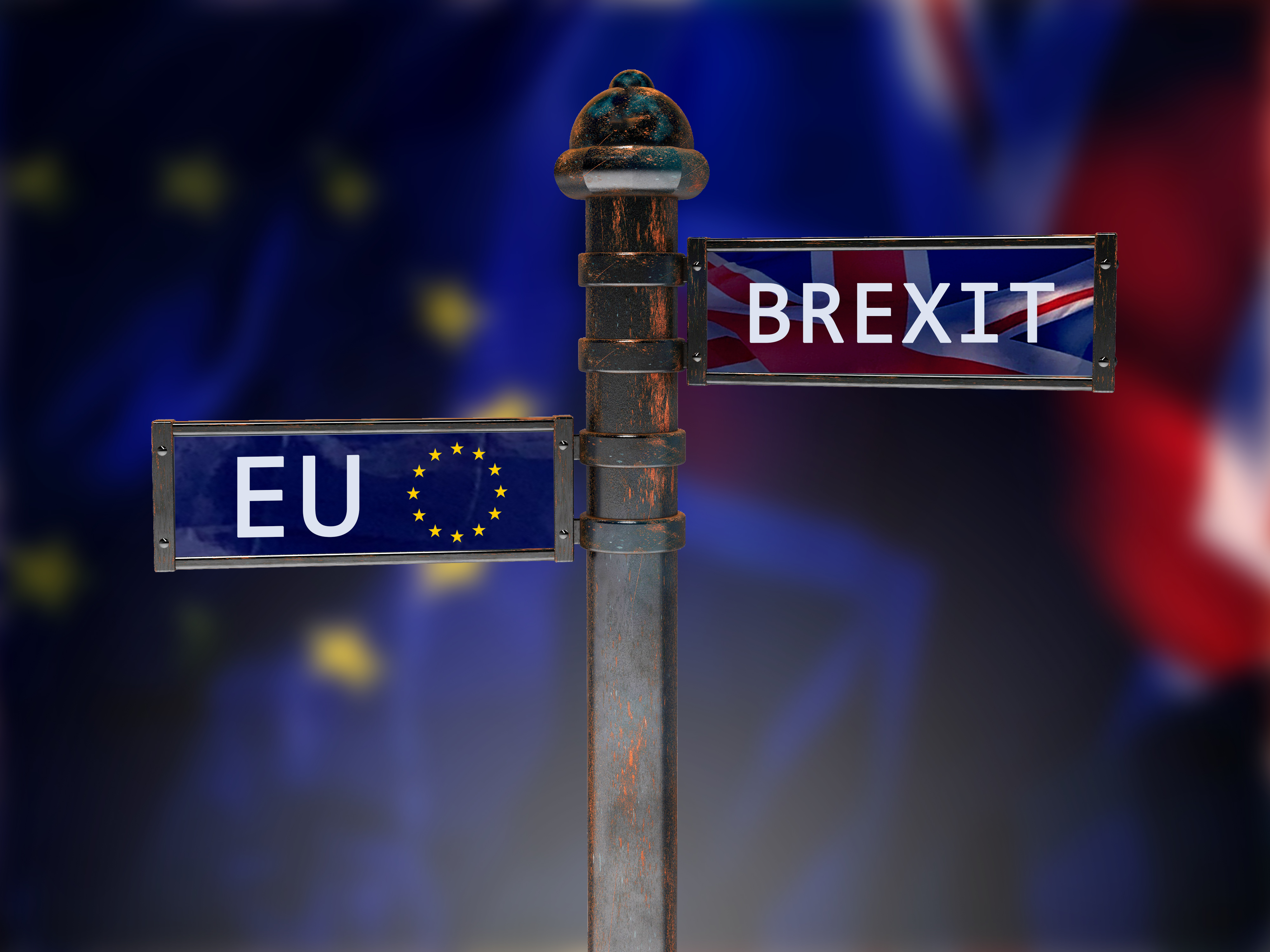 Brexit auf Wegweiser